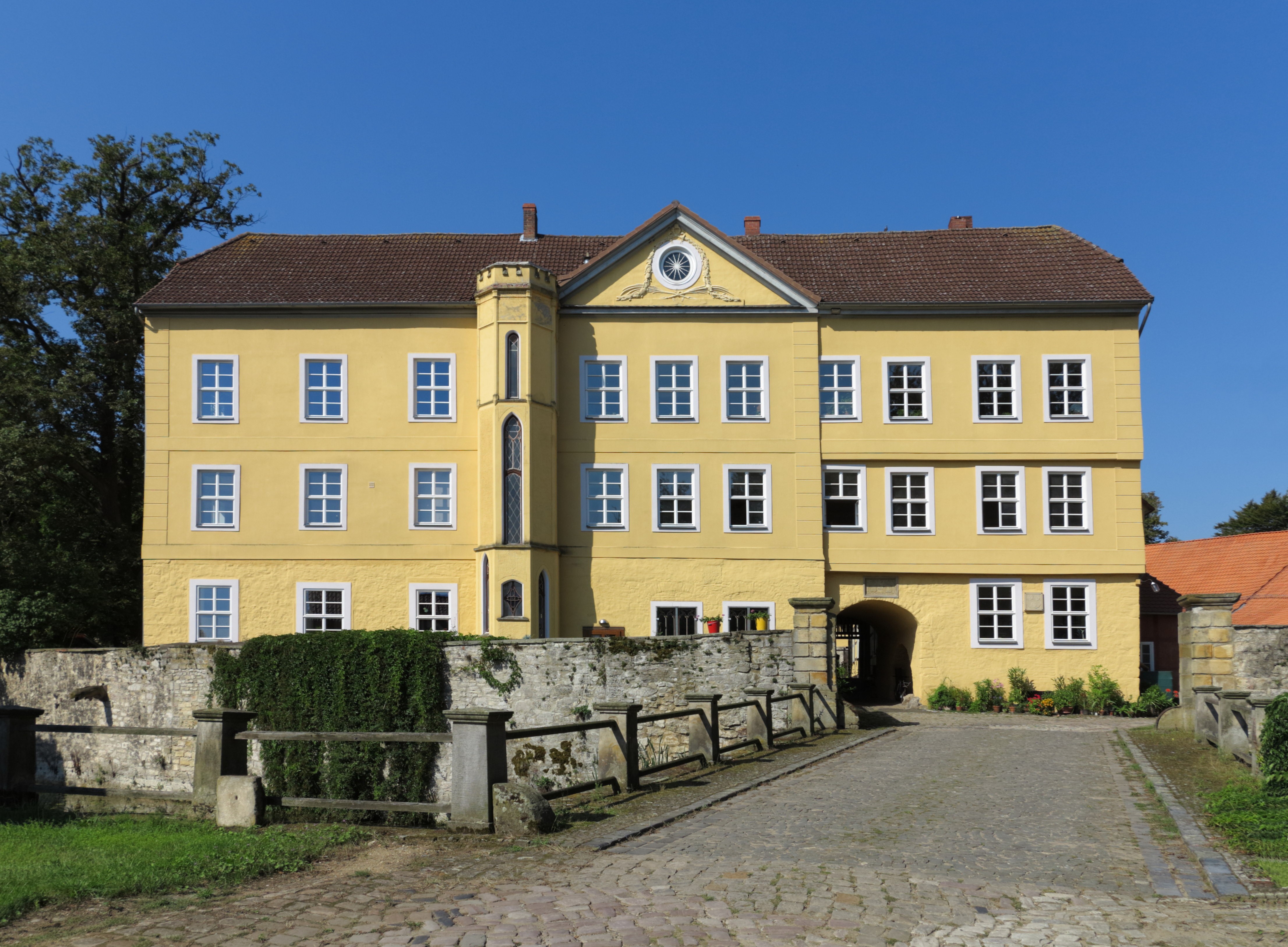 Burg Esbeck